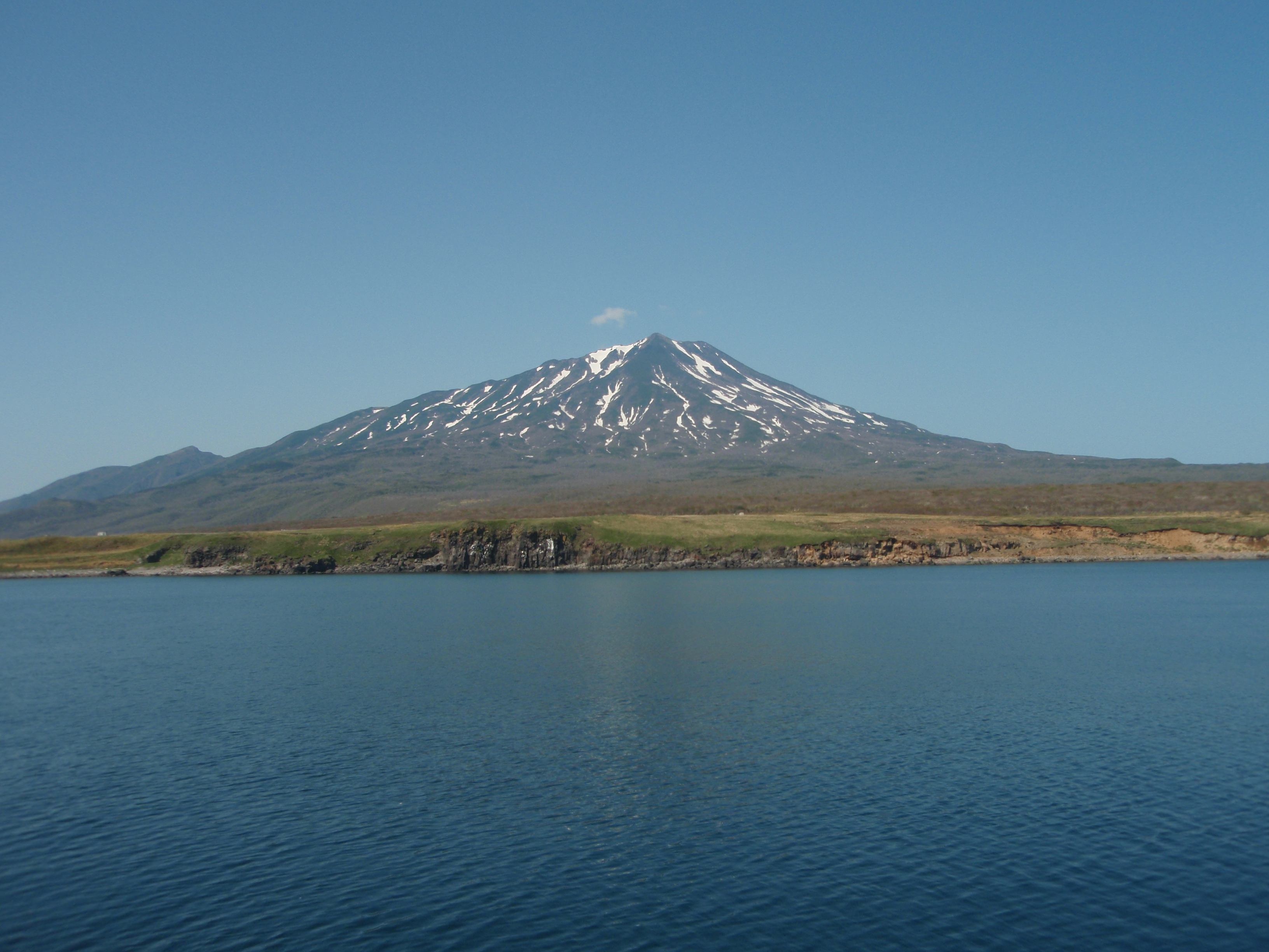 Вид вулкана Богдан Хмельницкий с рейда залива Китовый (Охотское побережье острова Итуруп)